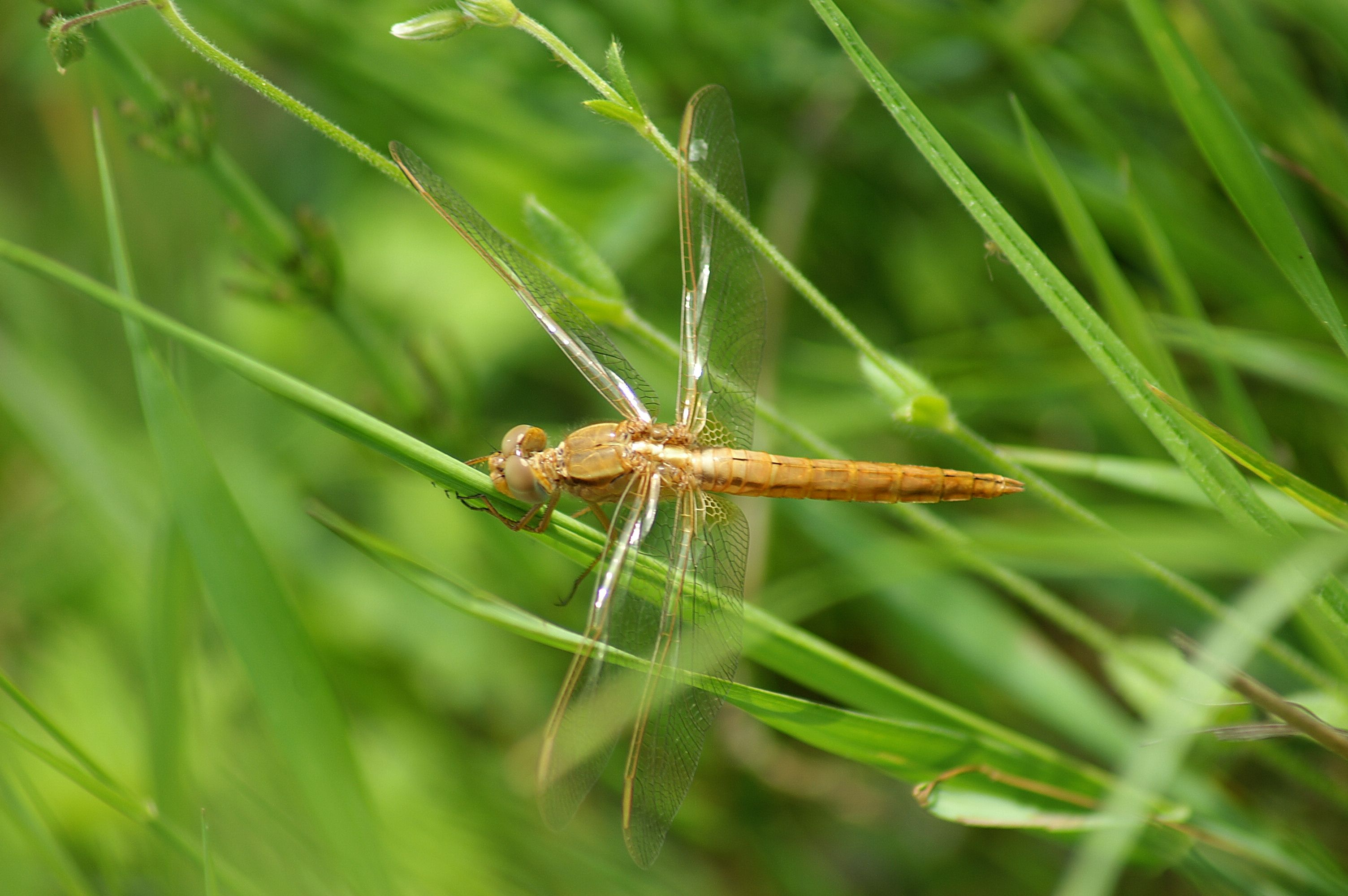 Die Feuerlibelle (Crocothemis erythraea), hier ein frisch geschlüpftes Männchen, ist eine Libellenart aus der Familie der Segellibellen (Libellulidae), die zu den Großlibellen (Anisoptera) gehören.